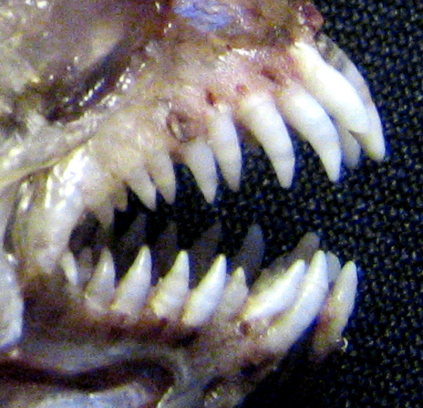 Dents de tanche-tautogue